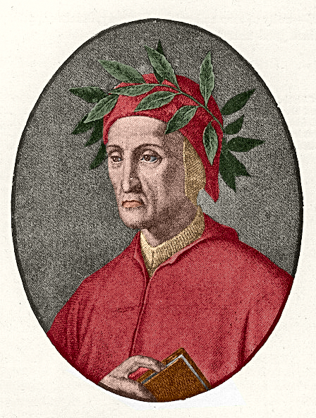 Dante Alighieri PD tekening van UT Library, ingekleurd naar bestaande schilderijen. thumb|left|Originele (niet-ingekleurde) versie